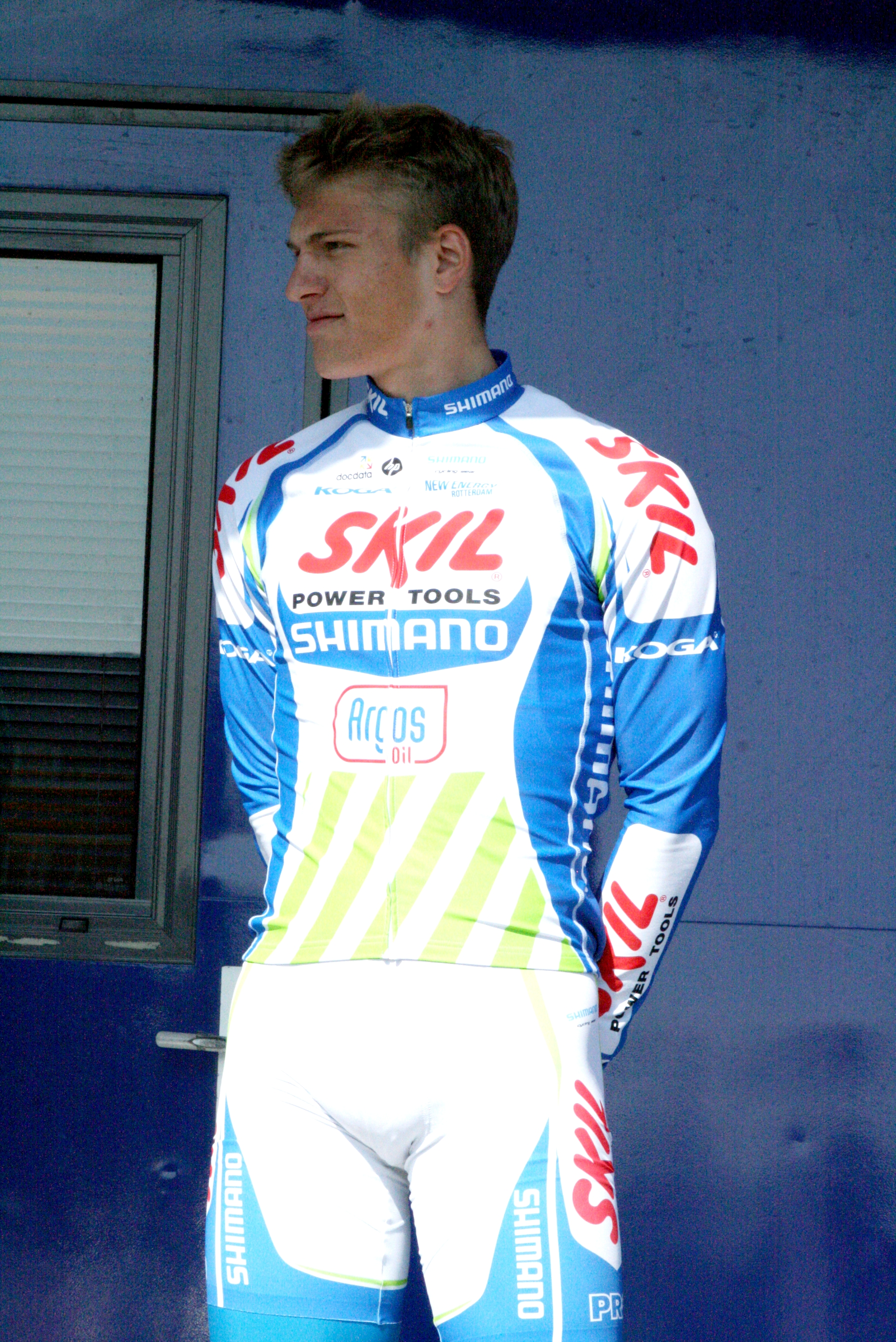 Présentation des coureurs au départ de la première étape Marcel Kittel